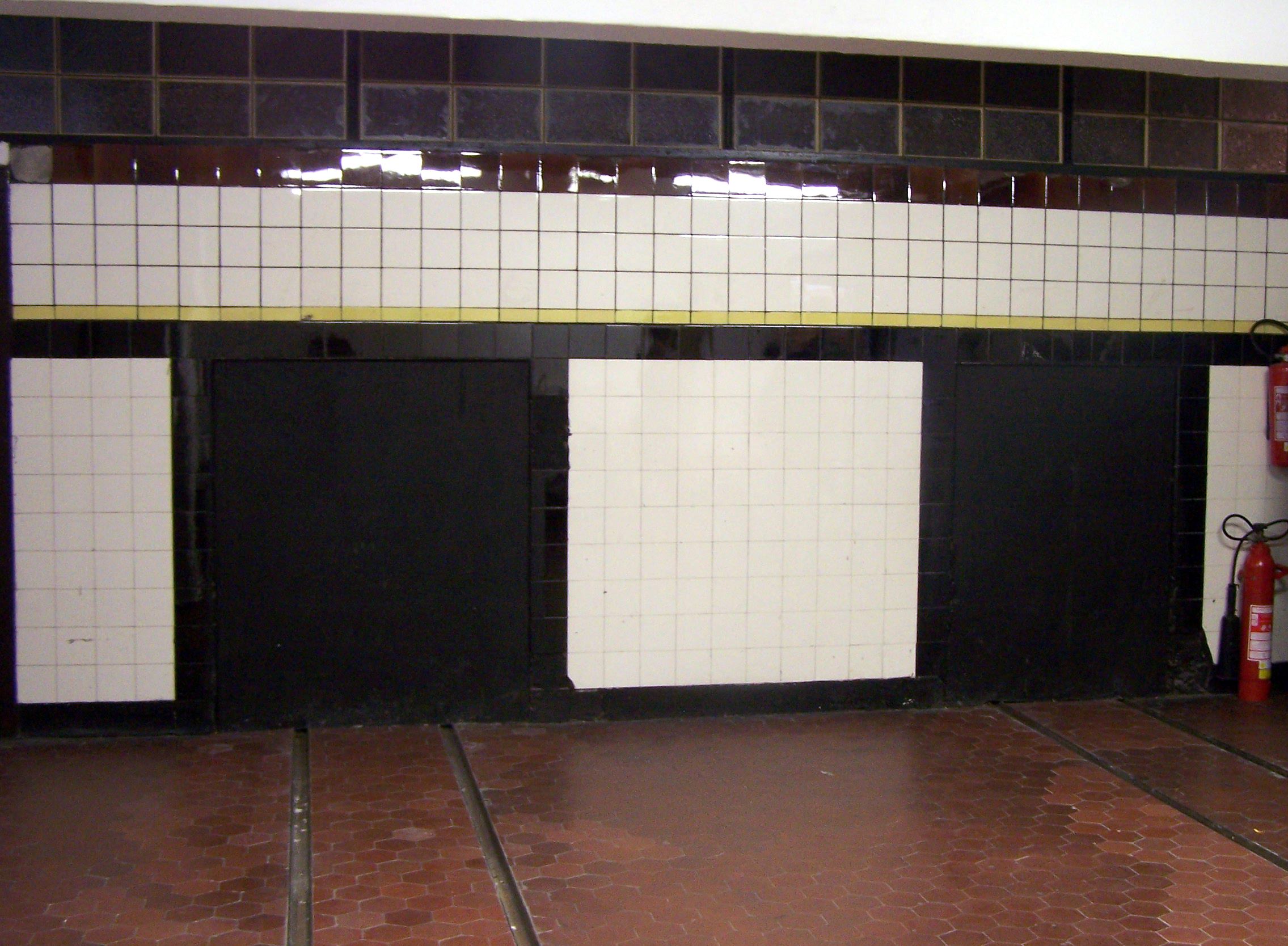 Pardubické krematorium – dvě již nepoužívané pece v prostoru pod hlavní smuteční síní. Zde se natáčelo několik scér z filmu Spalovač mrtvol.